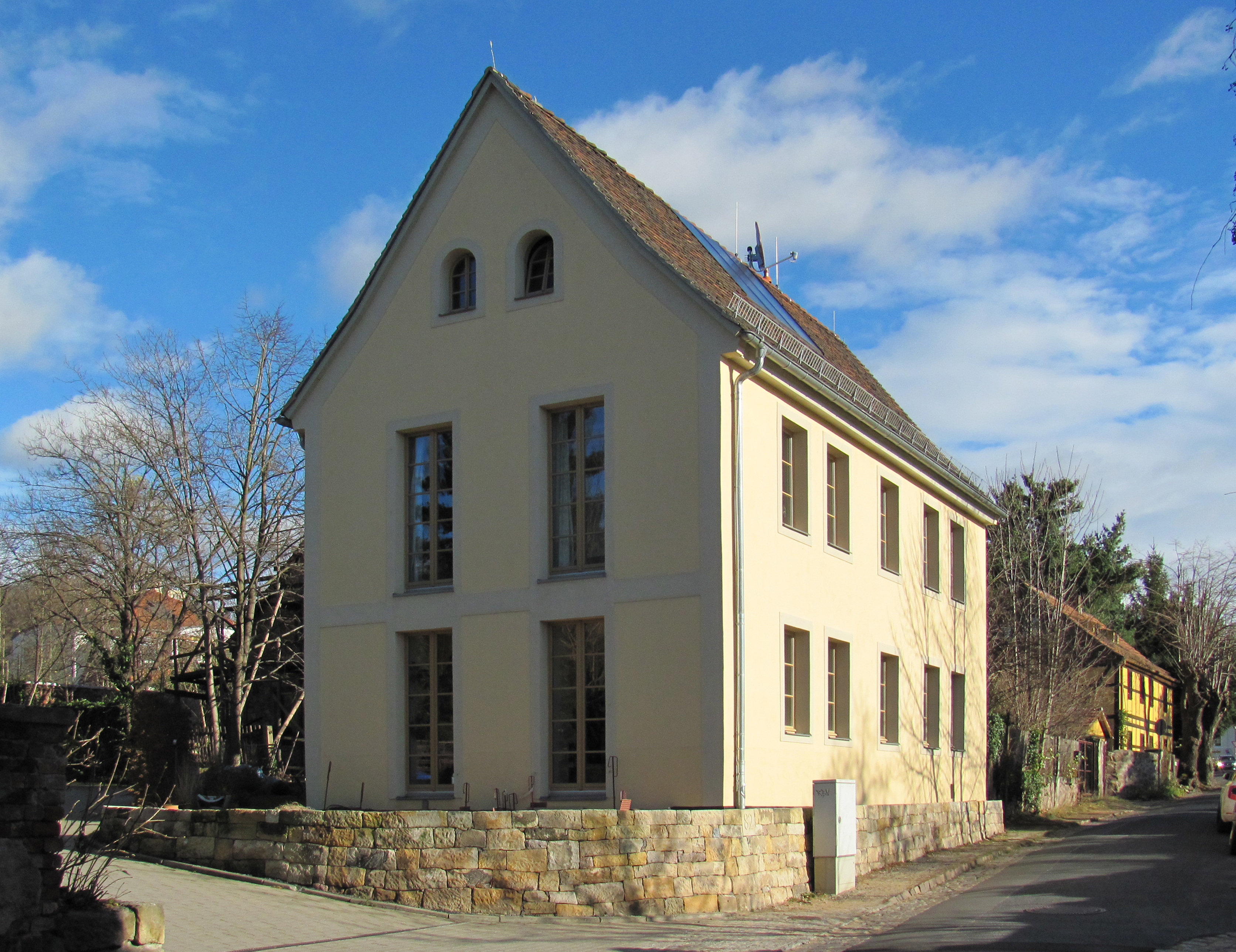 Radebeul, Haus Richter